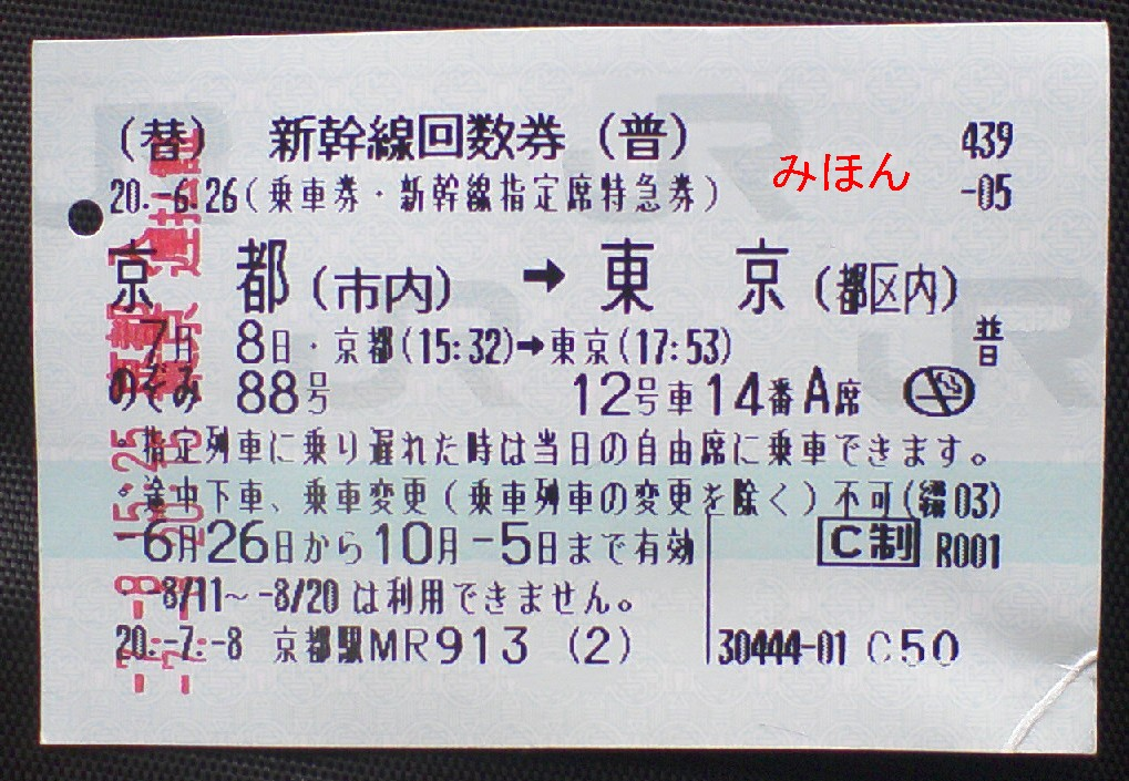 遅延による払い戻しが記載された切符